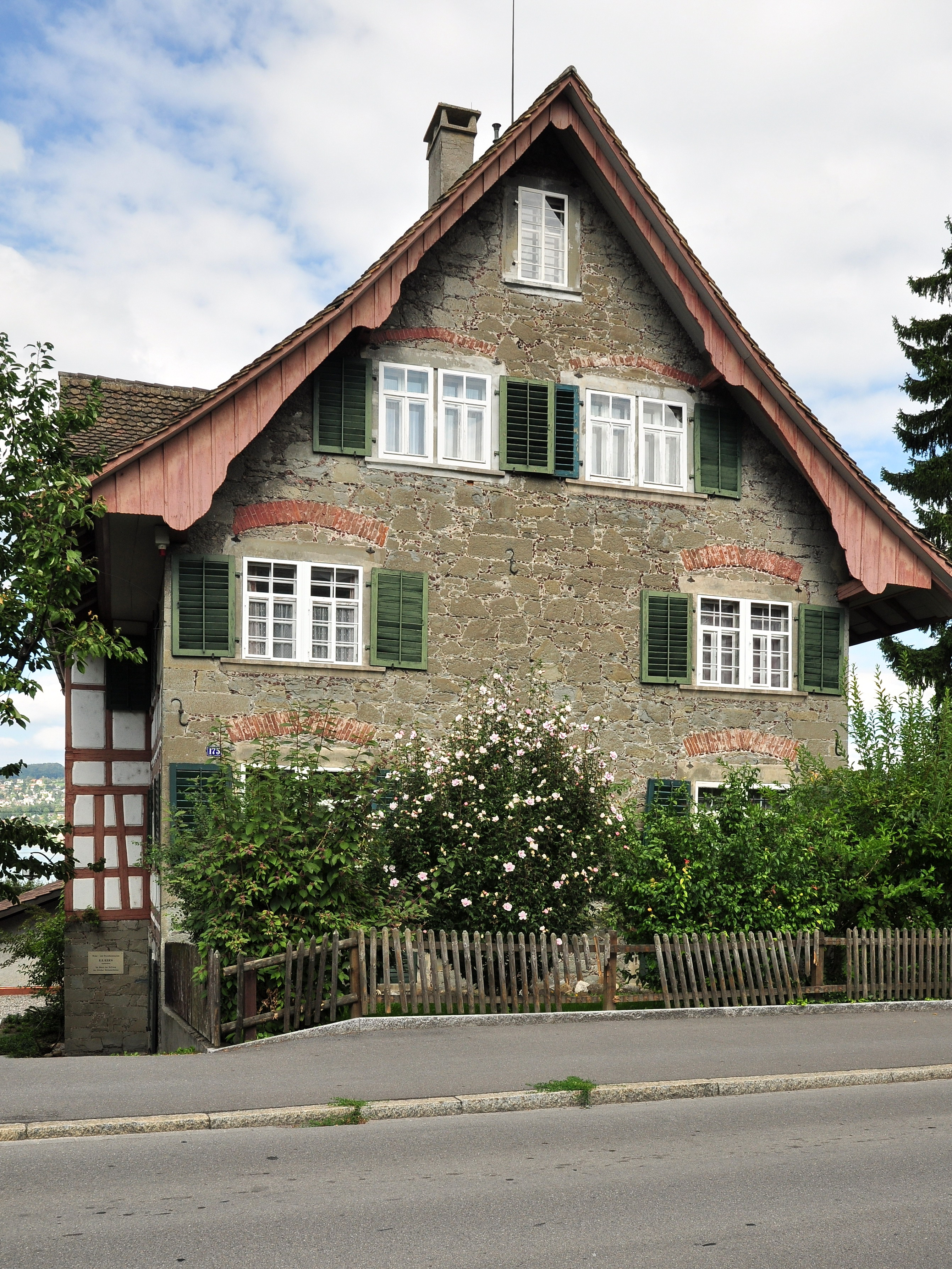 Sogenanntes «Agentenhaus», Seestrasse 175 in Horgen (Switzerland)